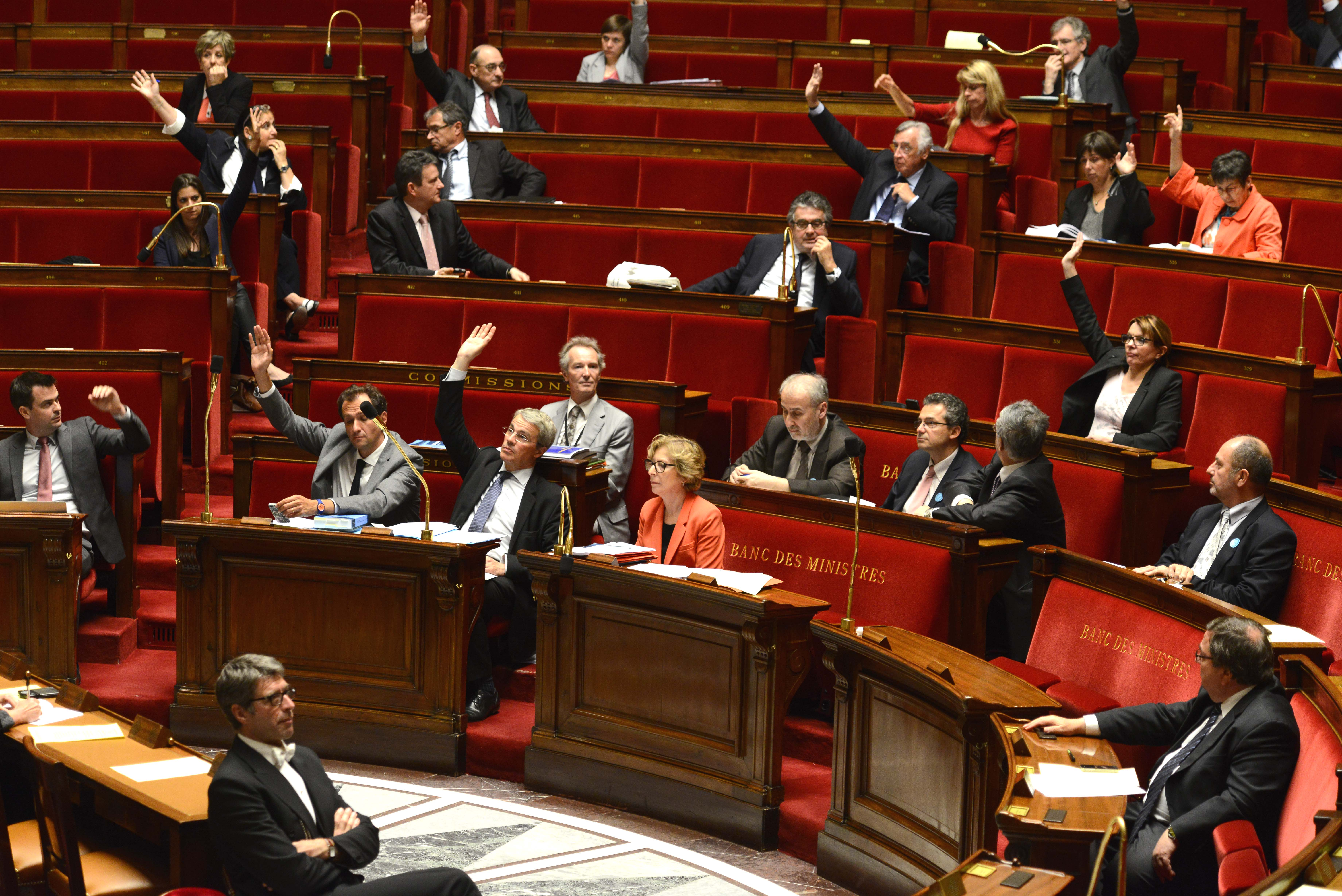 Genevièvre Fioraso presente le projet de loi relatif a l'enseignement supérieur et à la recherche à l'Assemblée Nationale